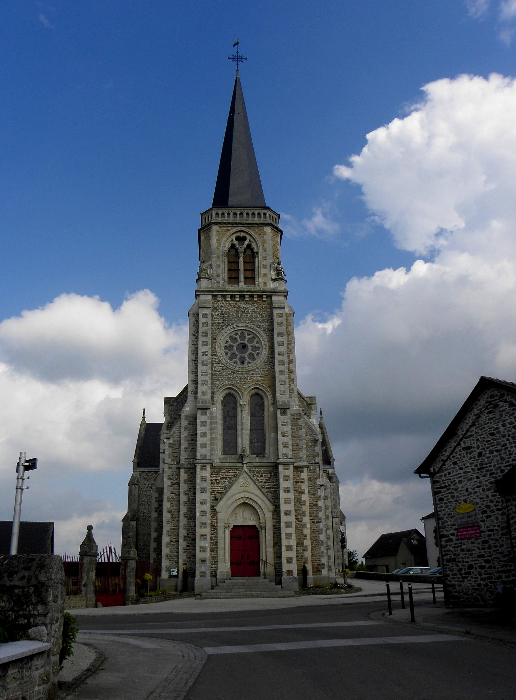 Église Notre-Dame de Commer (53).